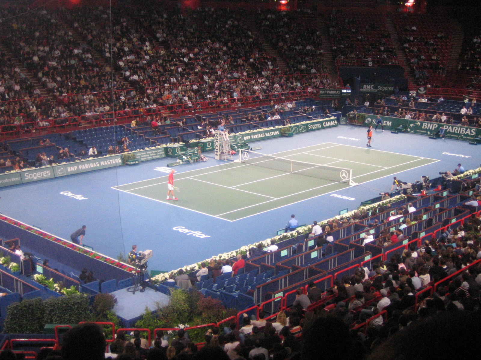 2008 BNP Paribas Masters